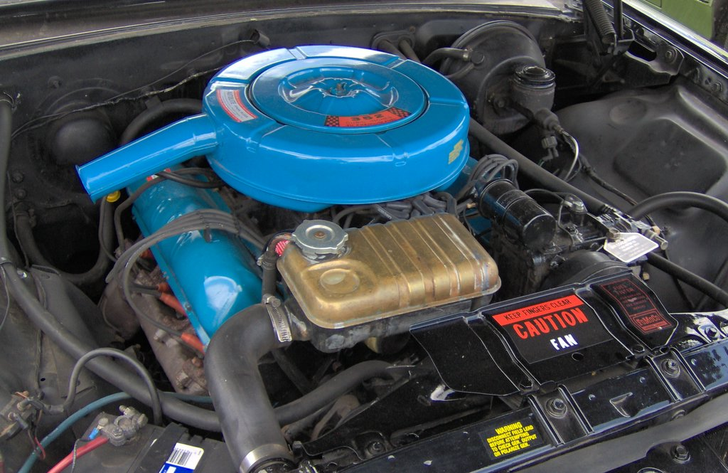 1964 Ford Galaxie 500 XL 352 "FE" big-block V8